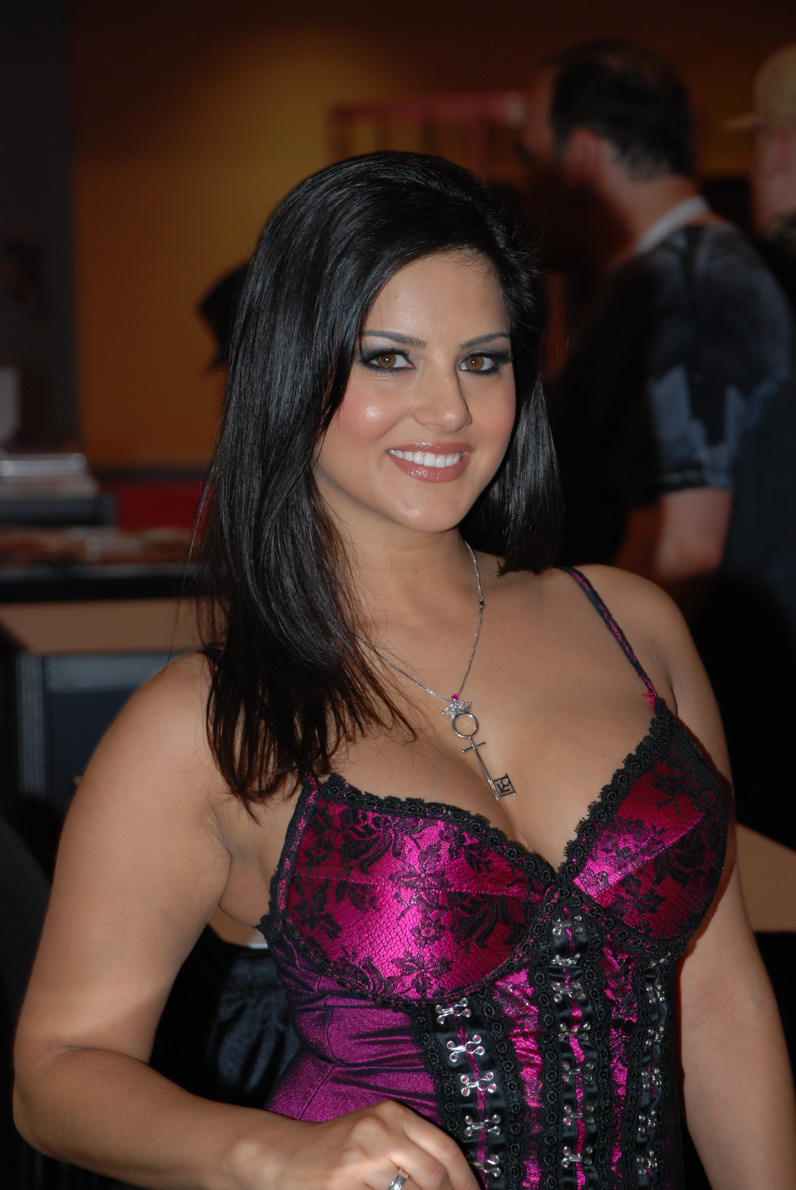 Miami Exxxotica 5-10-09 Nikon 295